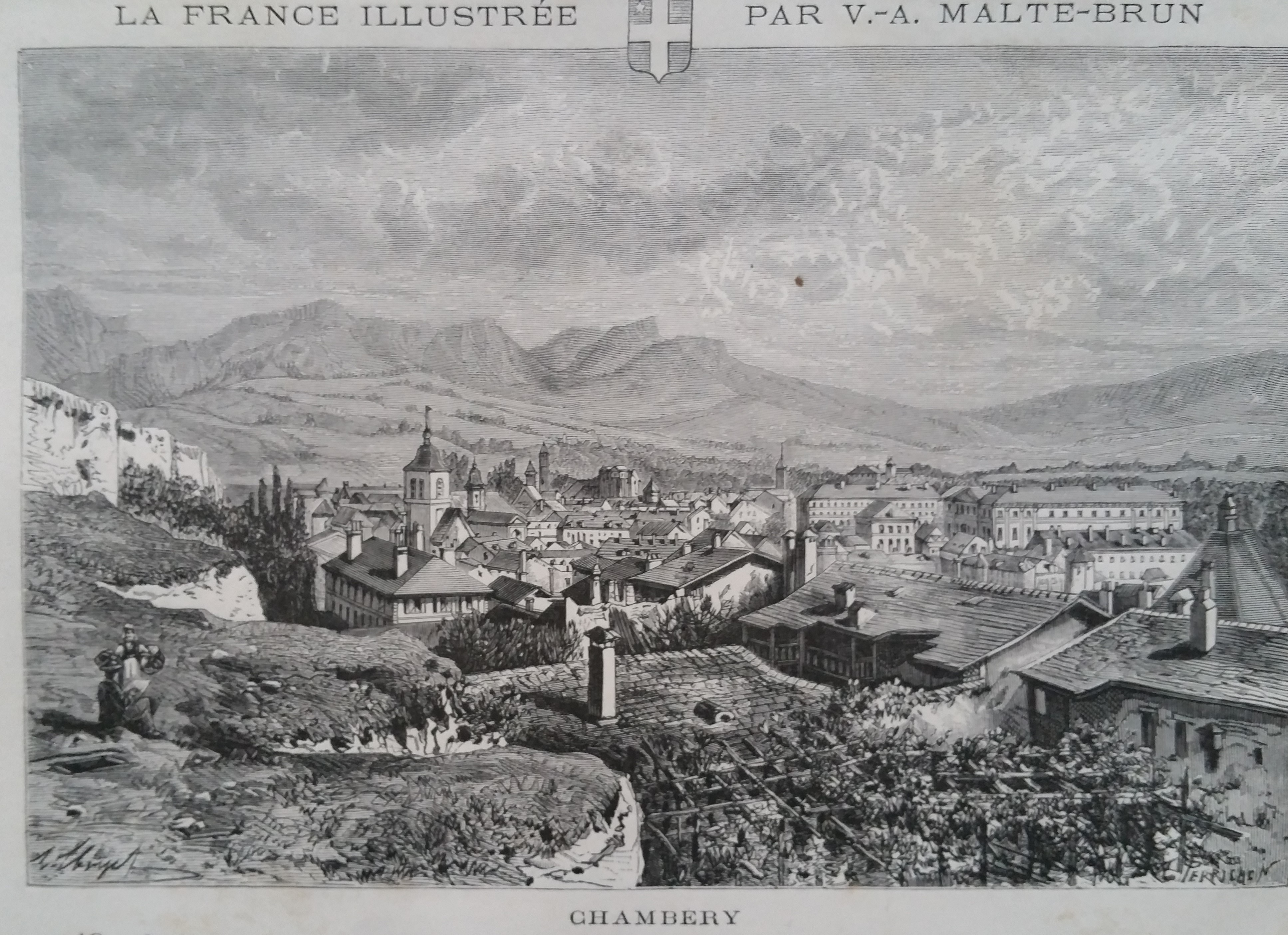 Chambéry vers l'an 1880 vu par le géographe français V.-A. MALTE-BRUN